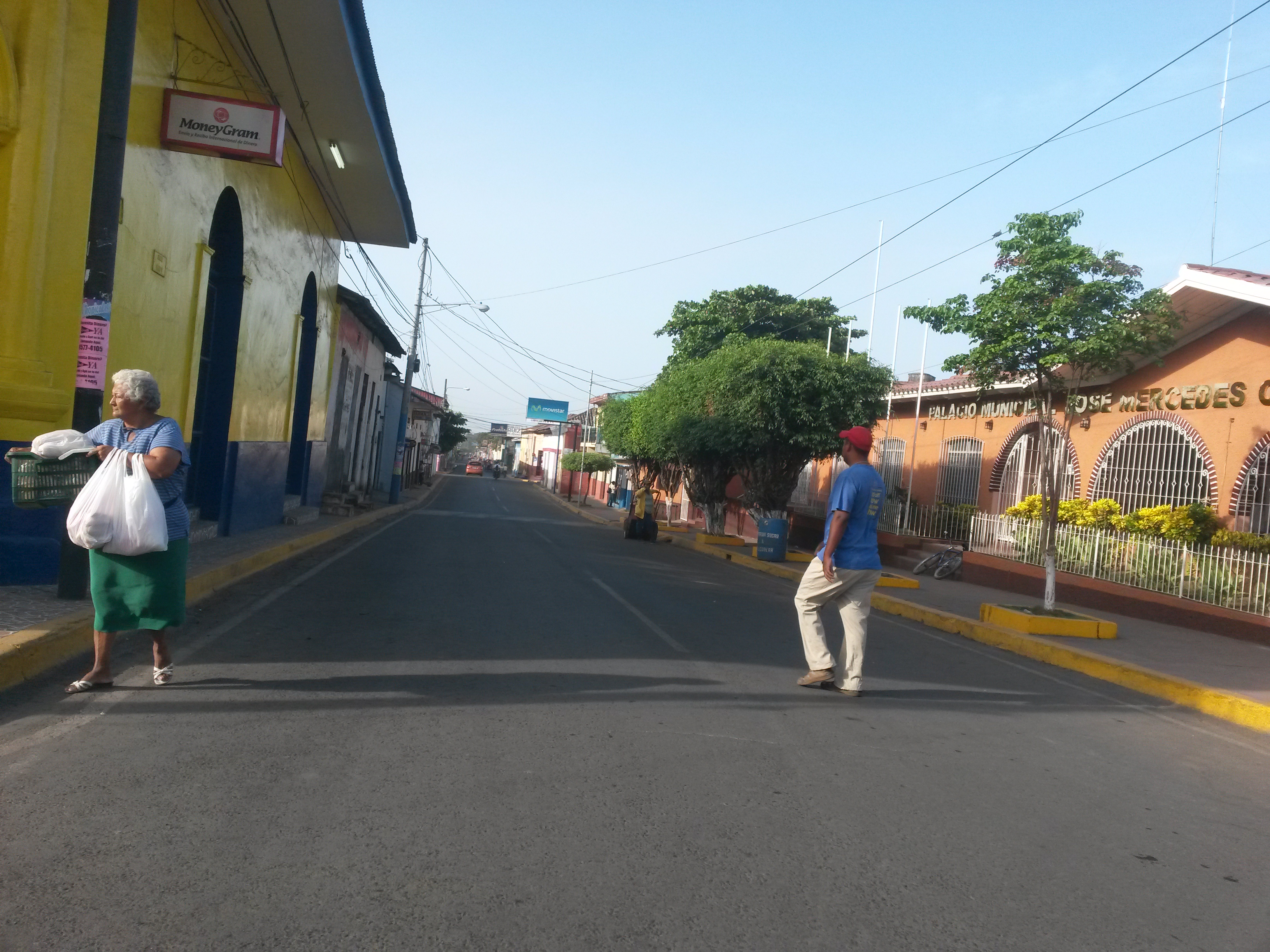 Calle #5 Avenida Central Chichigalpa